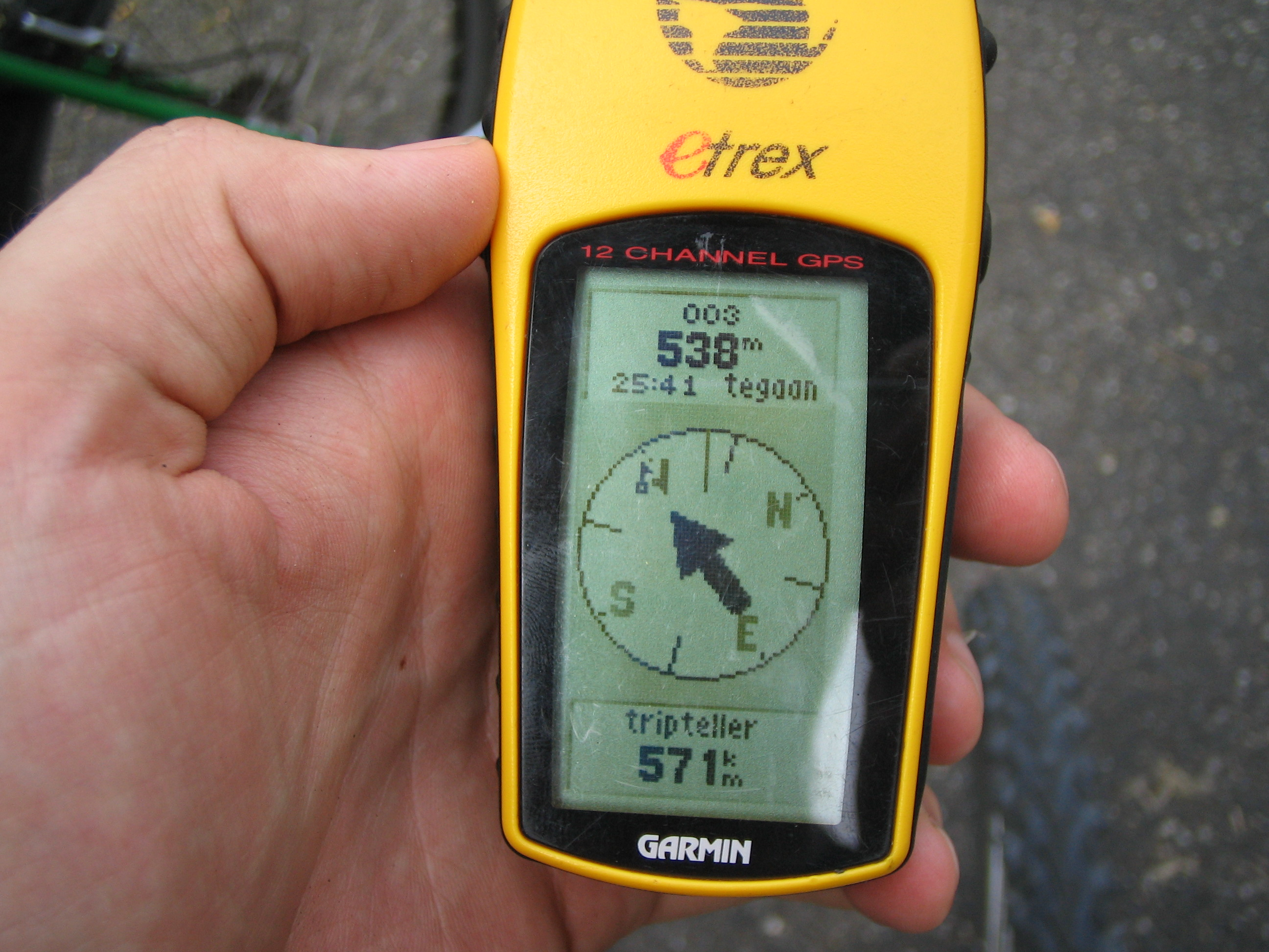 Deze GPS ontvanger hielp ons navigeren in de speurtocht